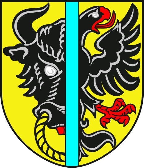 znak města Bystřice nad Pernštejnem